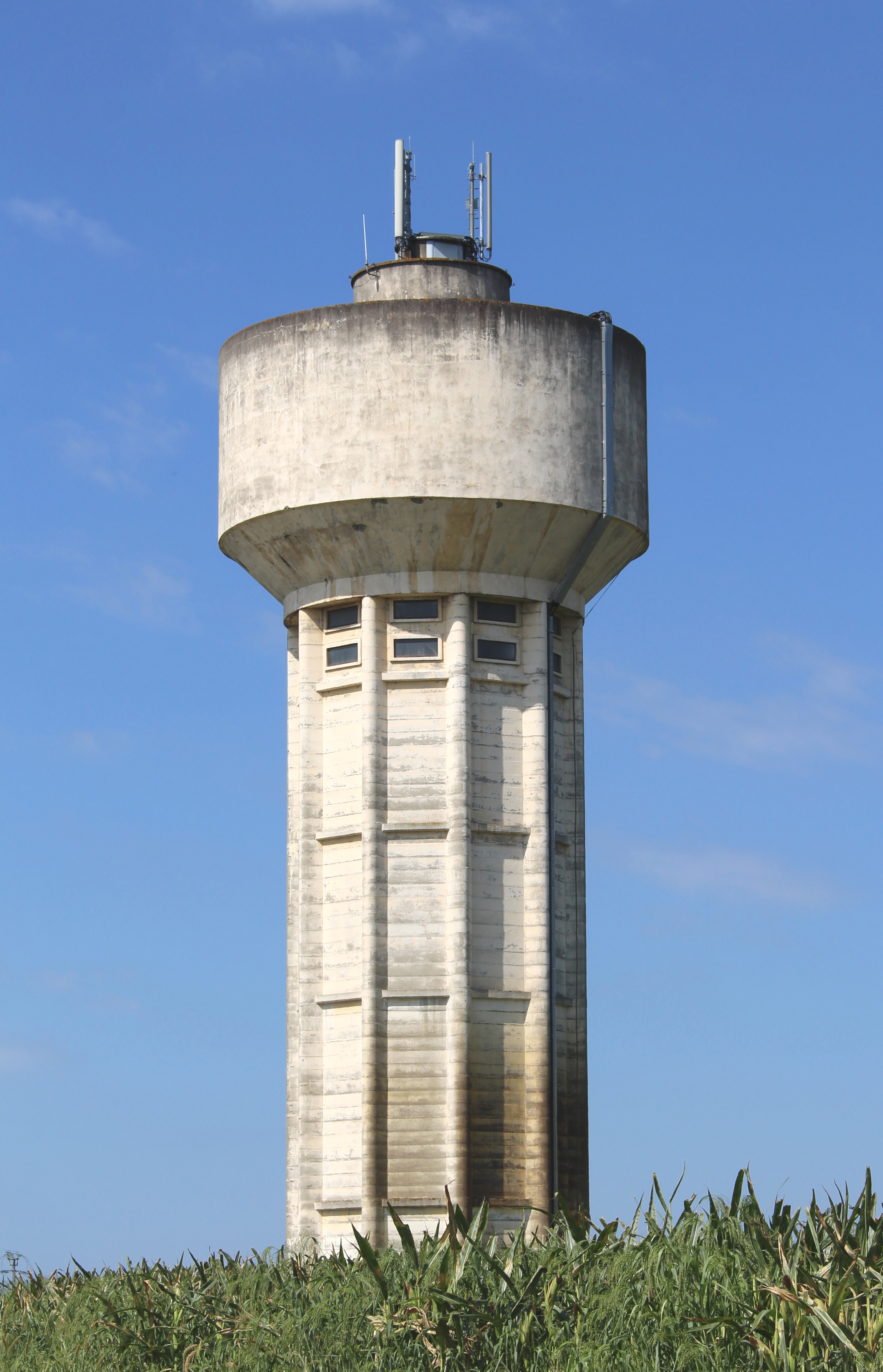 Château d'eau de Soublecause (Hautes-Pyrénées)